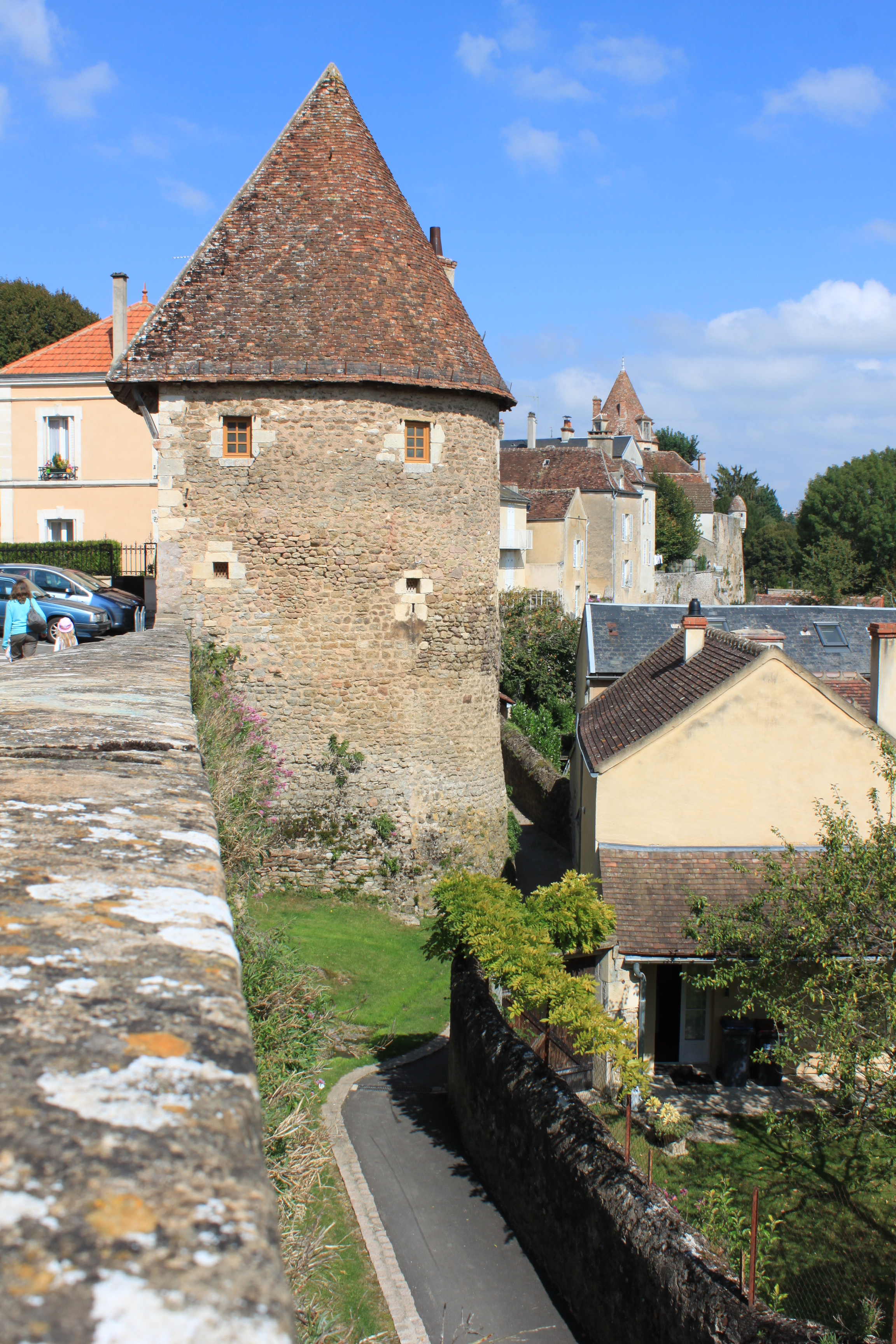 Avallon, Yonne, Bourgogne, France